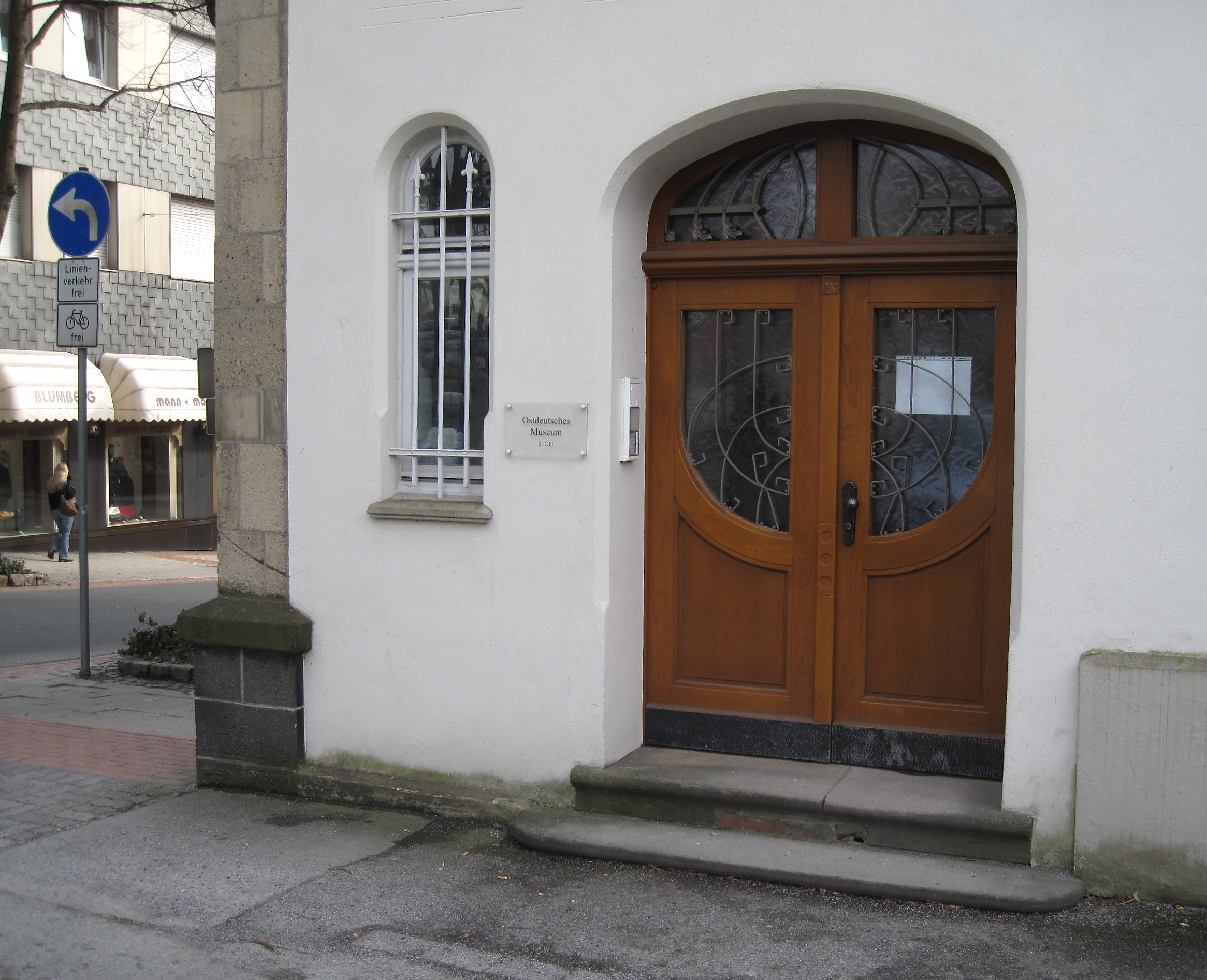 Eingang zum Heimatmuseum Ohlau im ehemaligen Rathaus von Letmathe, Hagener Straße 20, Iserlohn. Denkmalschutz seit 23. Juni 1983.